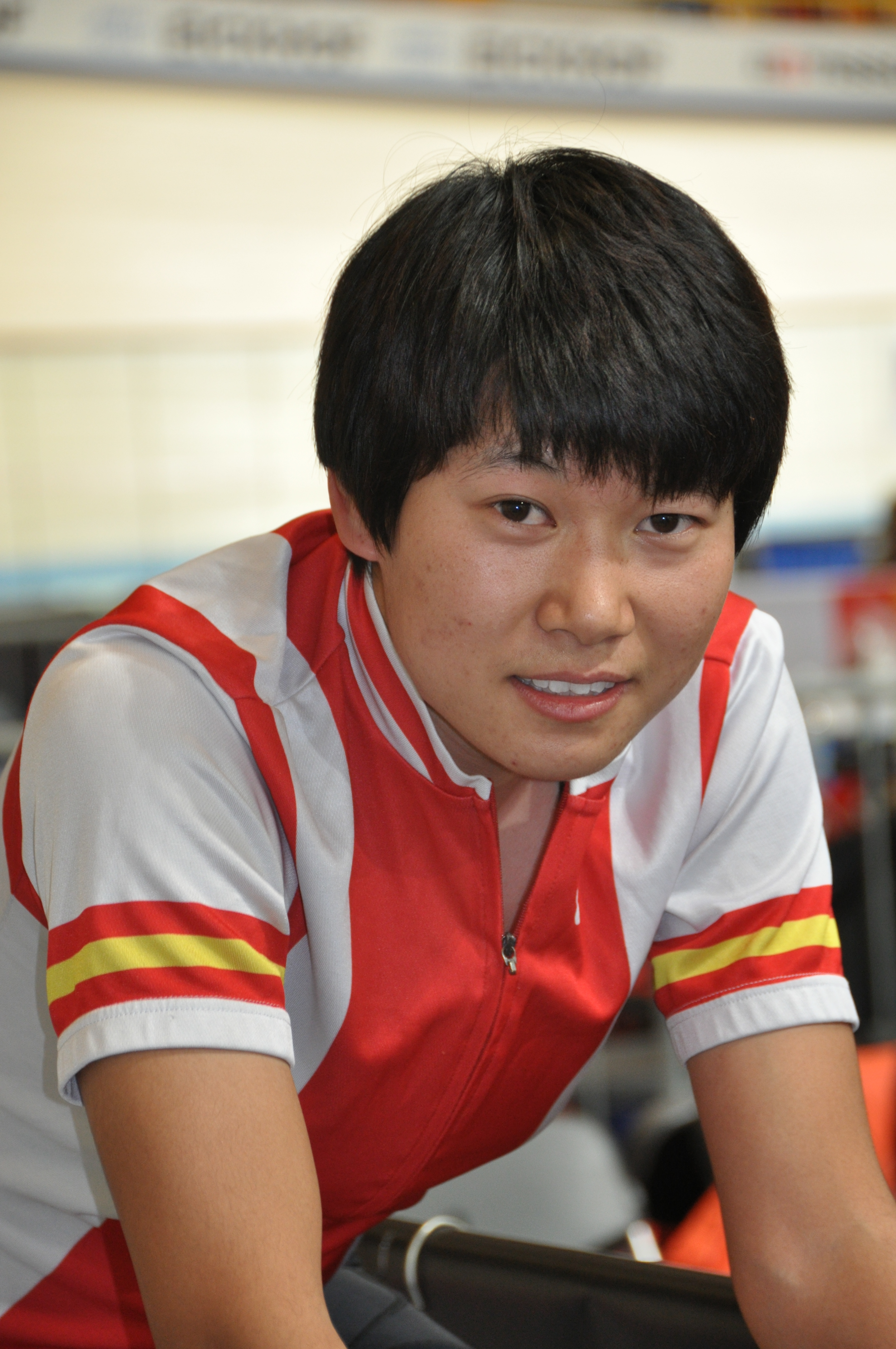 Wang Hong, Radsportlerin aus China